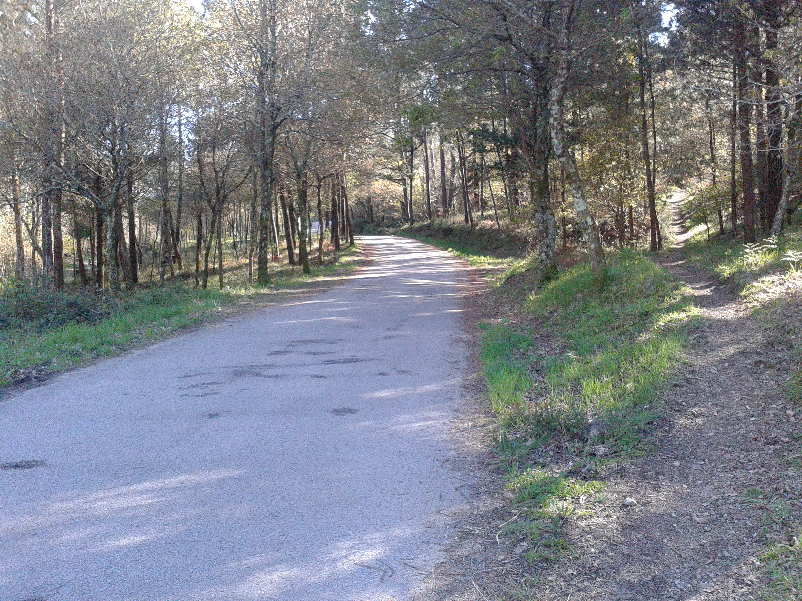 Estrada das Barrocas no 2016